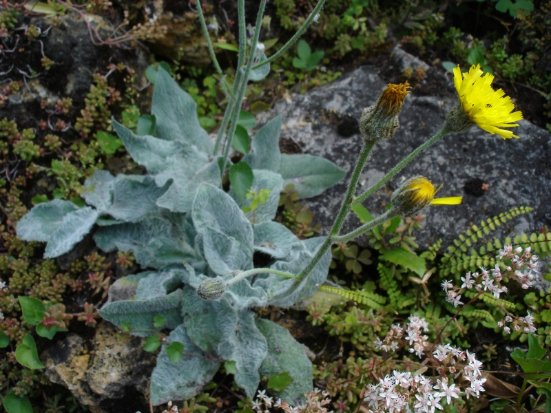 Hieracium lanatum, Jardin alpin, Jardin des Plantes de Paris